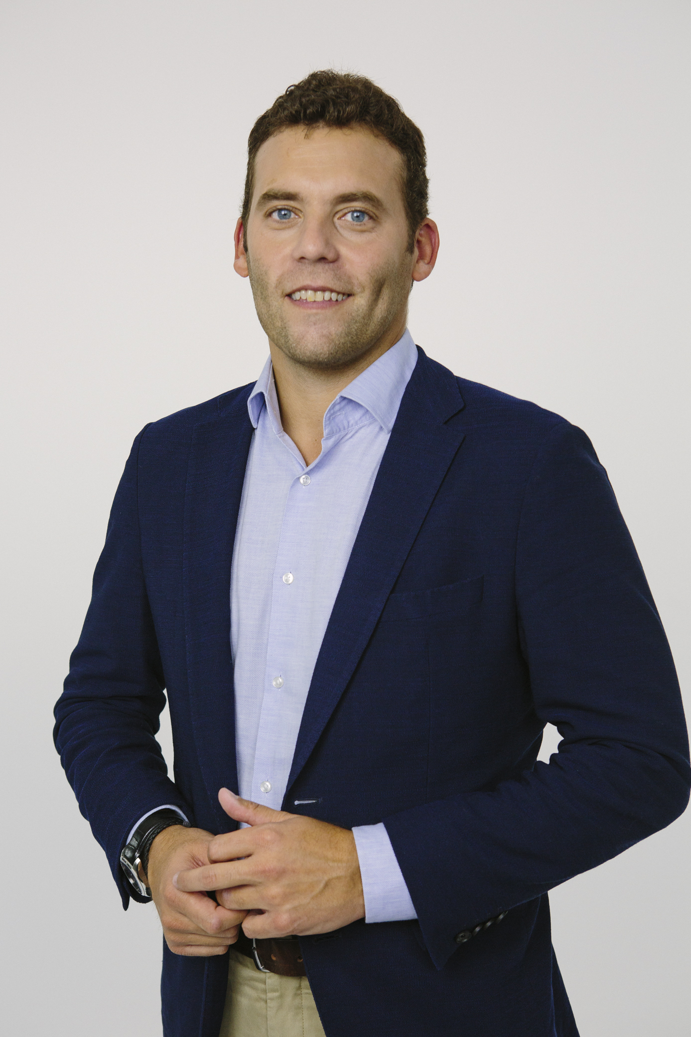 Jesús Carballo Martínez, presidente de la Real Federación Española de Gimnasia y bicampeón mundial de gimnasia artística, en una sesión fotográfica en septiembre de 2016.